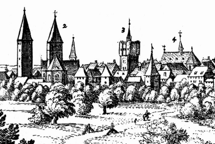 Speyer: St. Jakob (2) Marxtor (3) und Barfüßerkloster (3)